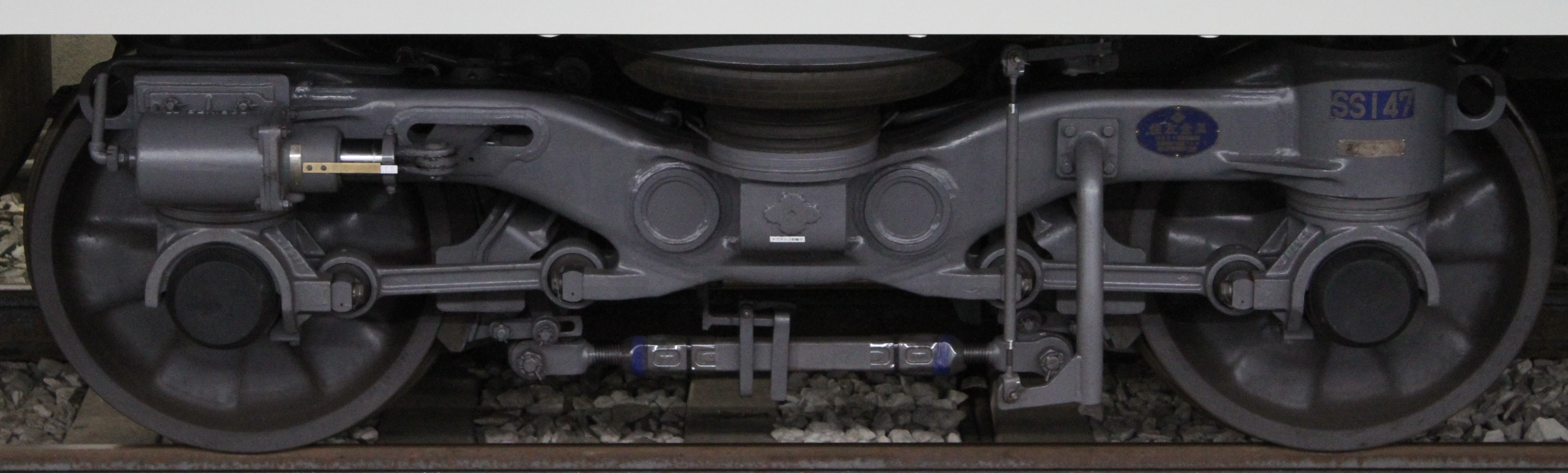 泉北7000系 住友金属工業 SS147型台車